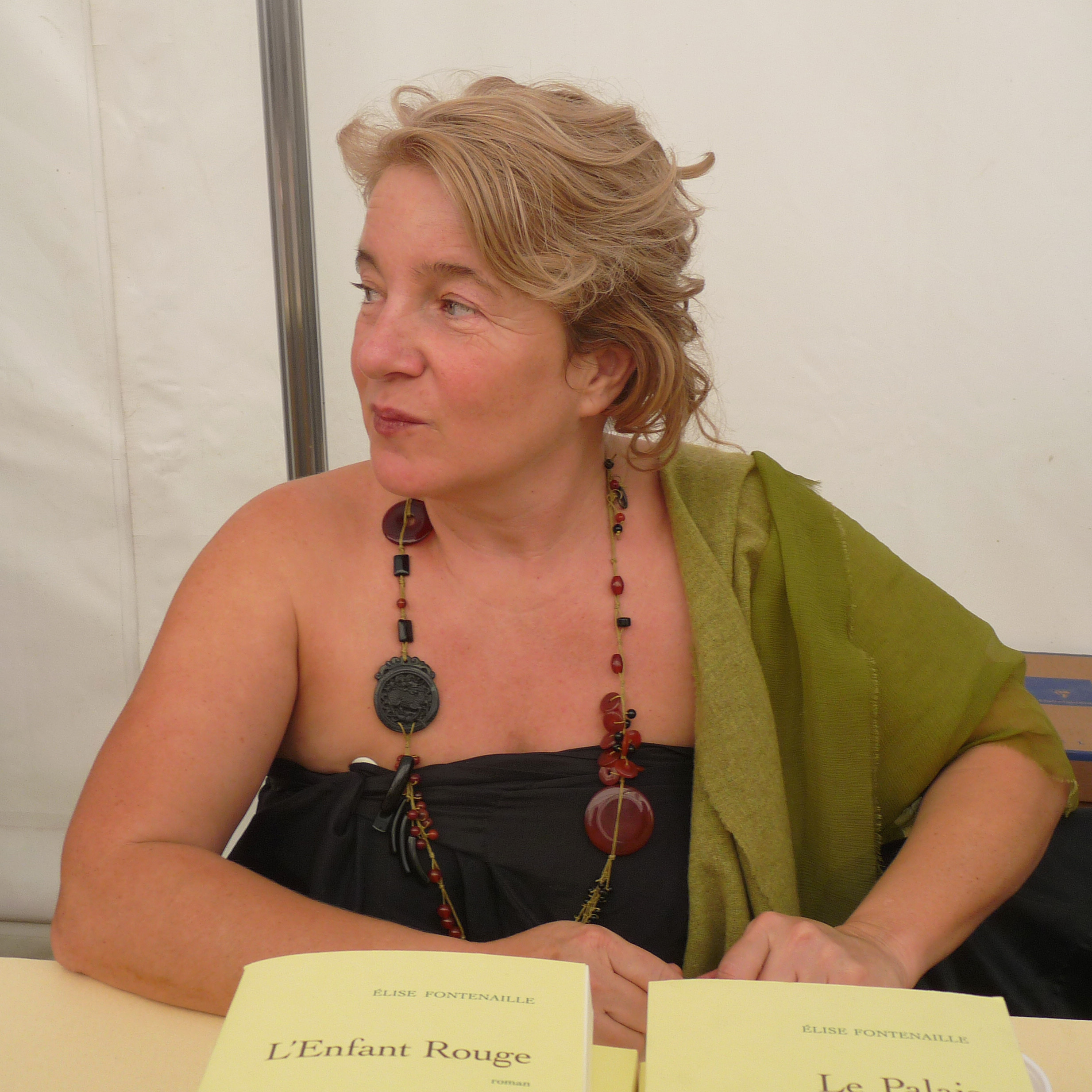 Élise Fontenaille en dédicace dans le cadre du "Livre sur la Place", Nancy, septembre 2011